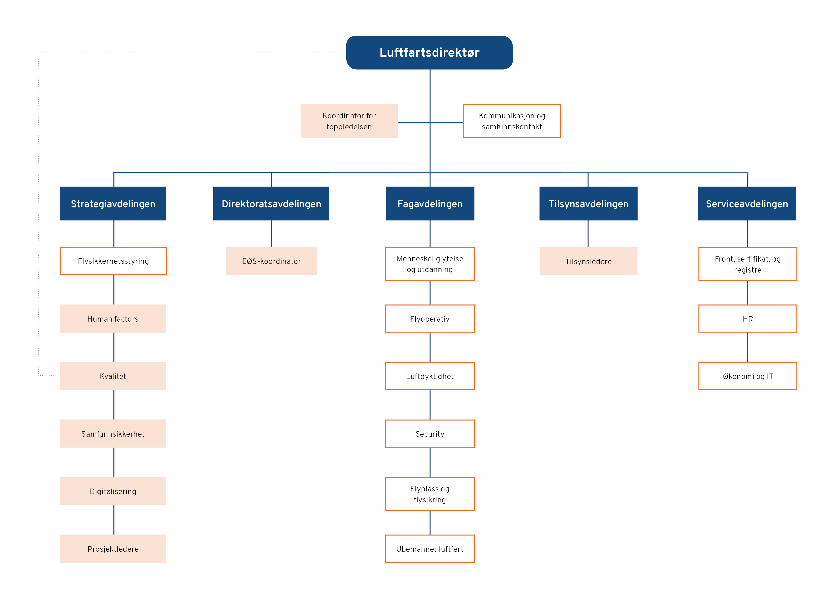 Organisasjonskart for Luftfartstilsynet, 2020